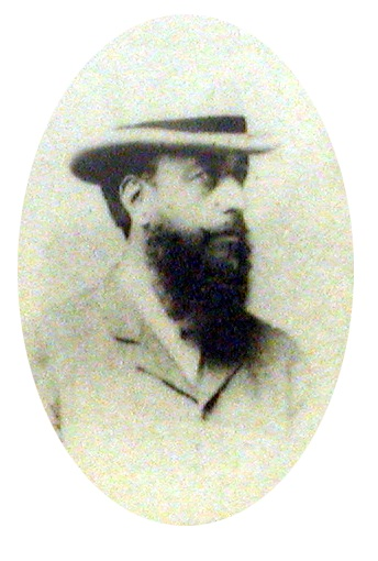 Bildbeschreibung: Victor Wilhelm Russ